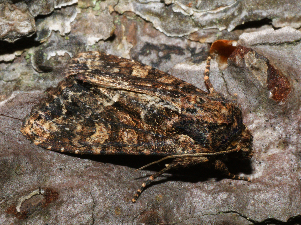 Exemplar found: Russia, Moscow Oblast, Serebryano-Prudsky District, near village Lishnyagi, 09.06.2013, by light МО, Серебряно-Прудский р-н, окрестности деревни Лишняги, 09.06.2013, на свет